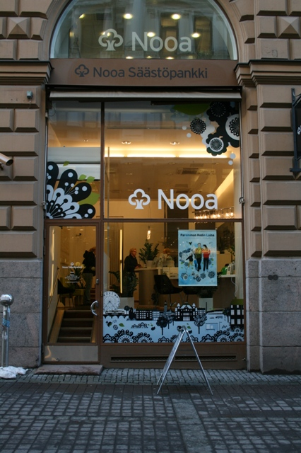 Nooa Säästöpankki